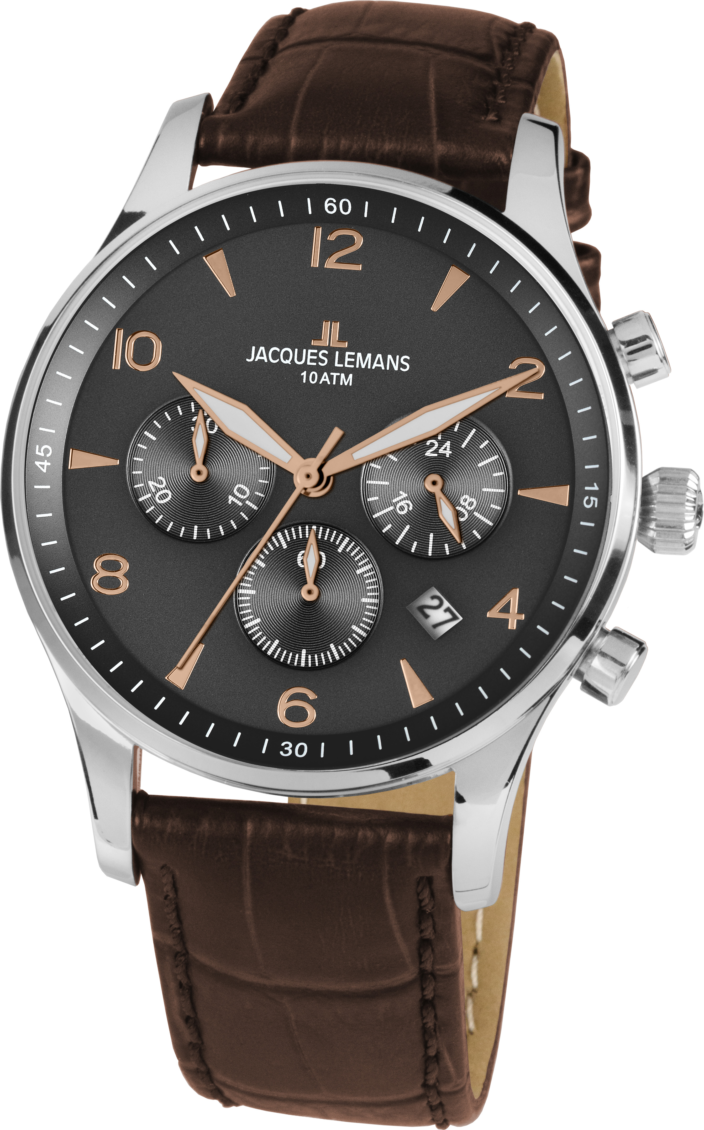 Das Uhrenmodell Classic 1-1654ZK der Jacques Lemans GmbH